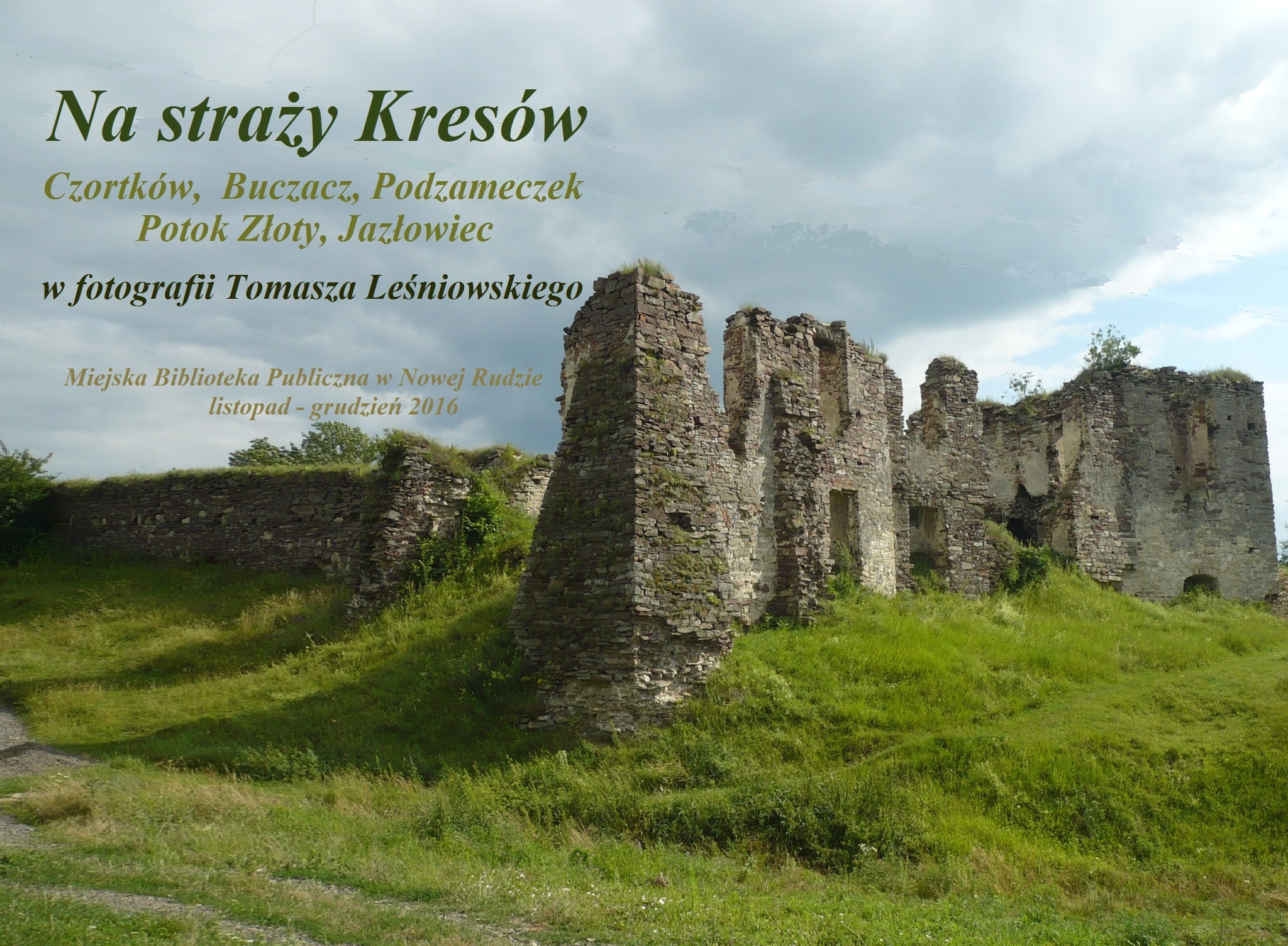 Zdjęcia Zamku w Podzameczku na plakacie